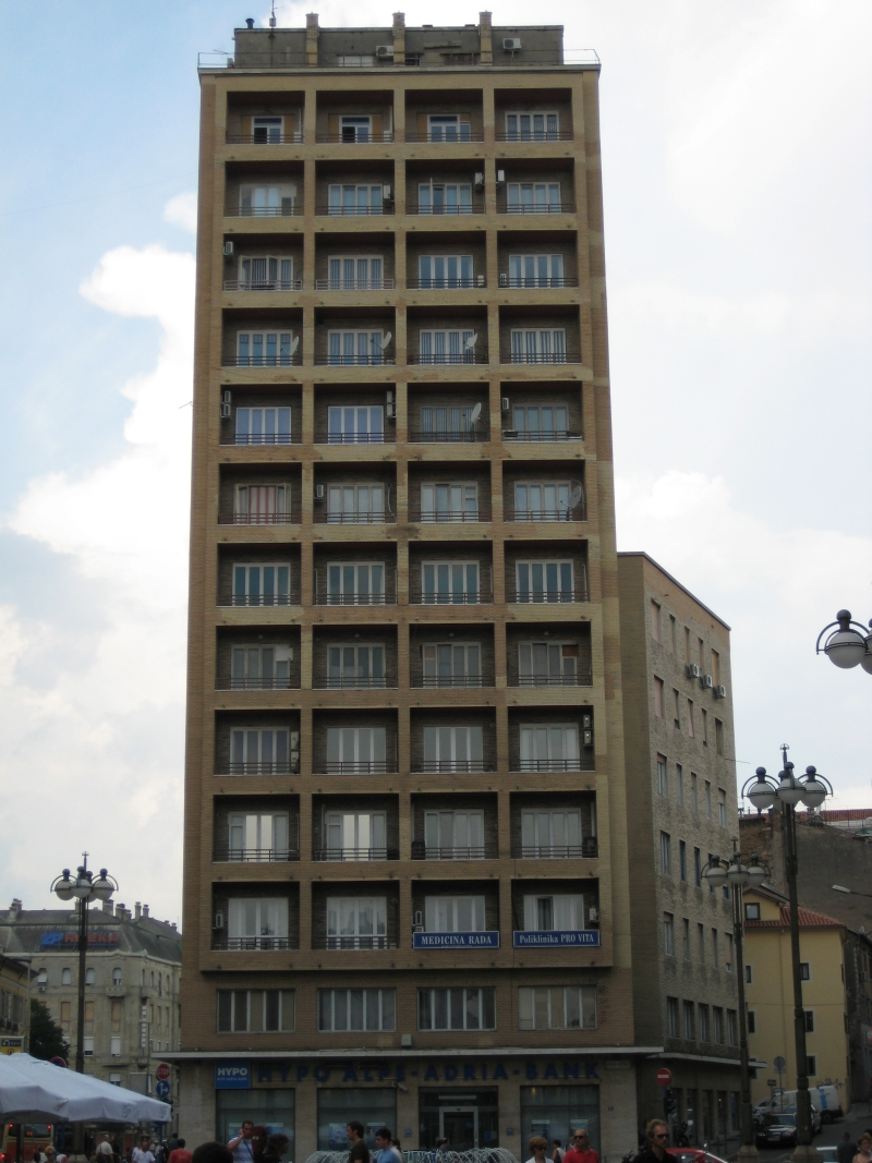 Riječki Veliki neboder, građen od 1939. - 1942. g. po projektu Umberta Nordia Otvoren 1. travnja 1942. g. u Rijeci. Croatia